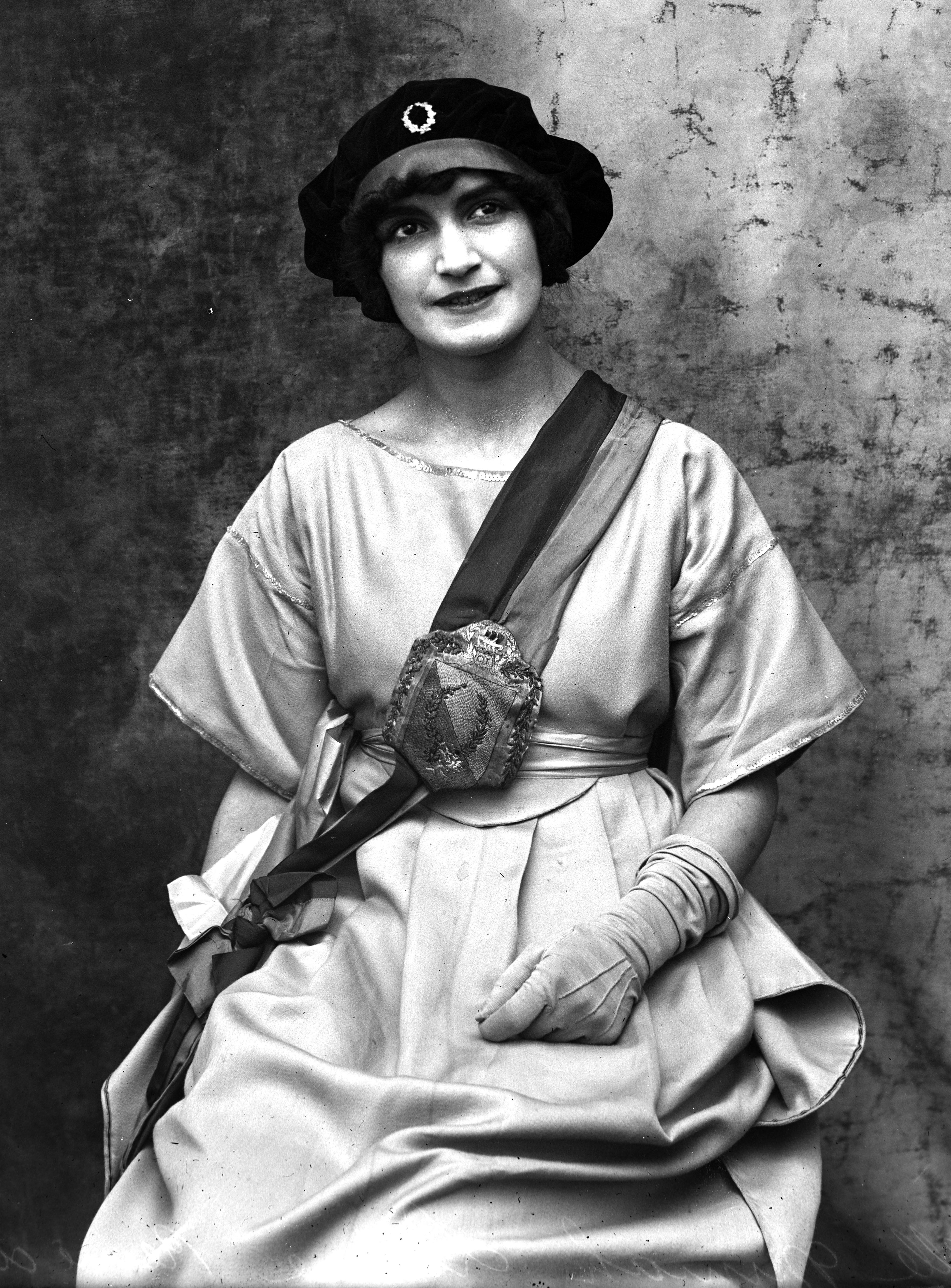 Mlle Miniah Lutèce Reine des étudiants de Paris élue le 26 février 1921 au Palais Pompéien, 47 boulevard Raspail, Paris. Détail de la photo